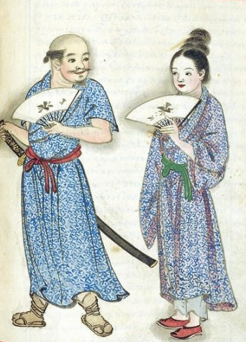 中文（香港）: 1595年的日本人